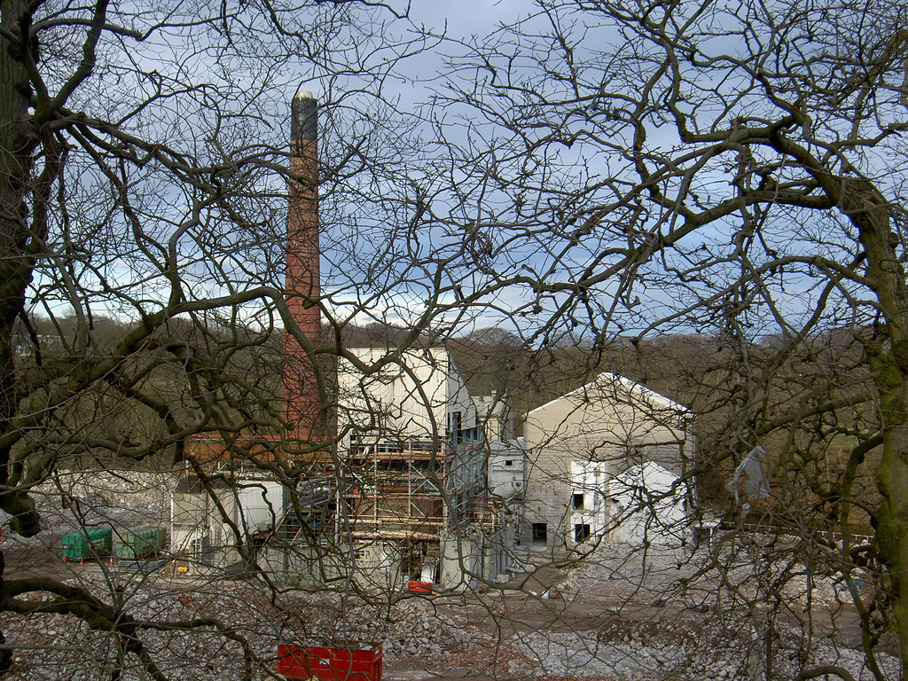 Donside Paper Mill under demolition